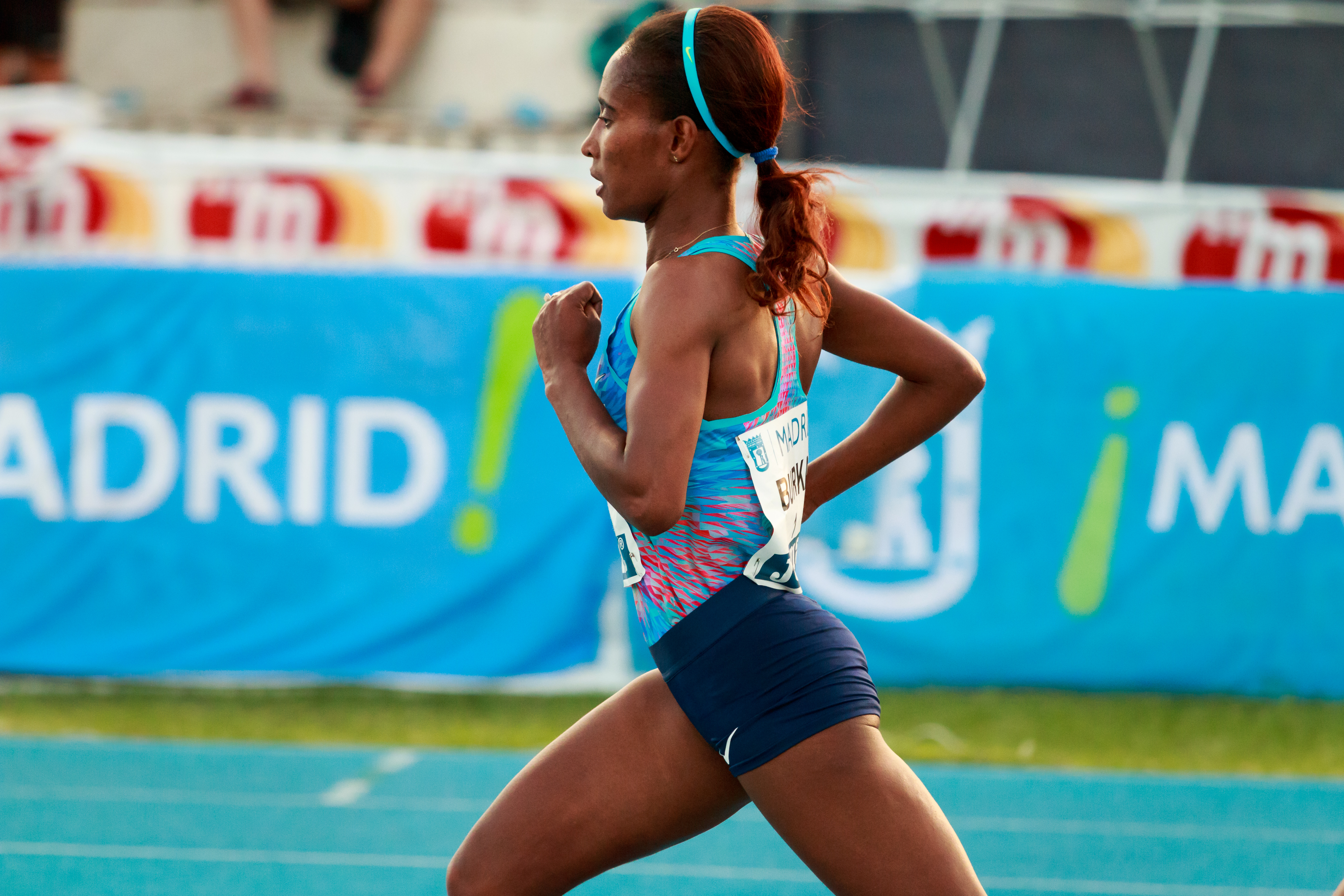 Gelete Burka (ETH). 3000m. IAAF World Challenge. Meeting Madrid 2017. Moratalaz, Madrid.